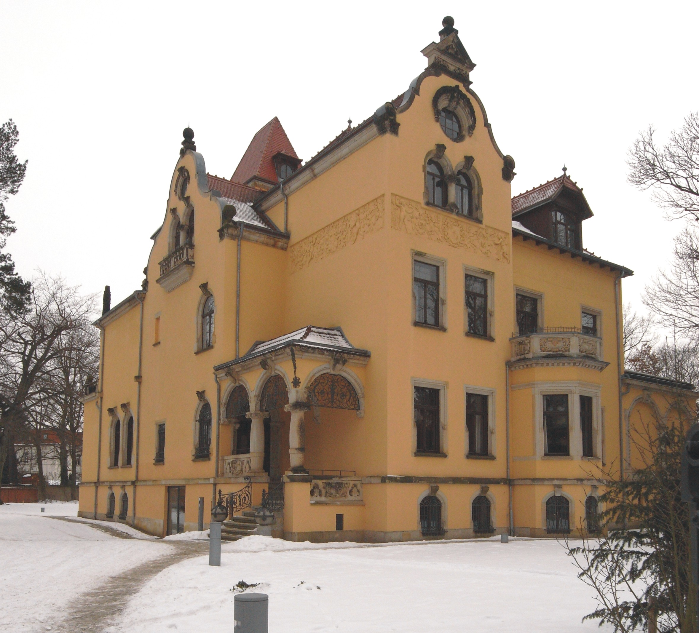 Dresden, Sächsisches Landesgymnasium für Musik Carl Maria von Weber, Mendelssohnallee 34 (Deutschland, Sachsen)